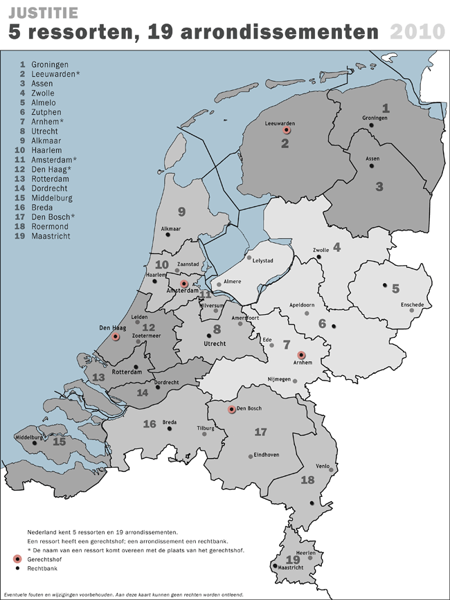 Justitiële gerechtelijke kaart per 1-1-2010: 19 arrondissementen en 5 ressorten. Samenstelling: Jan-Willem van Aalst op basis van eigen kaartmateriaal. Bron grenzen